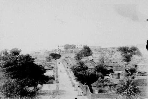 Une rue de Bakel après les travaux de voirie et les plantations ordonnées par le colonel Galliéni. Campagne de 1887-1888. Collection de 51 photos du Soudan français offerte par le Col. Joseph Galliéni